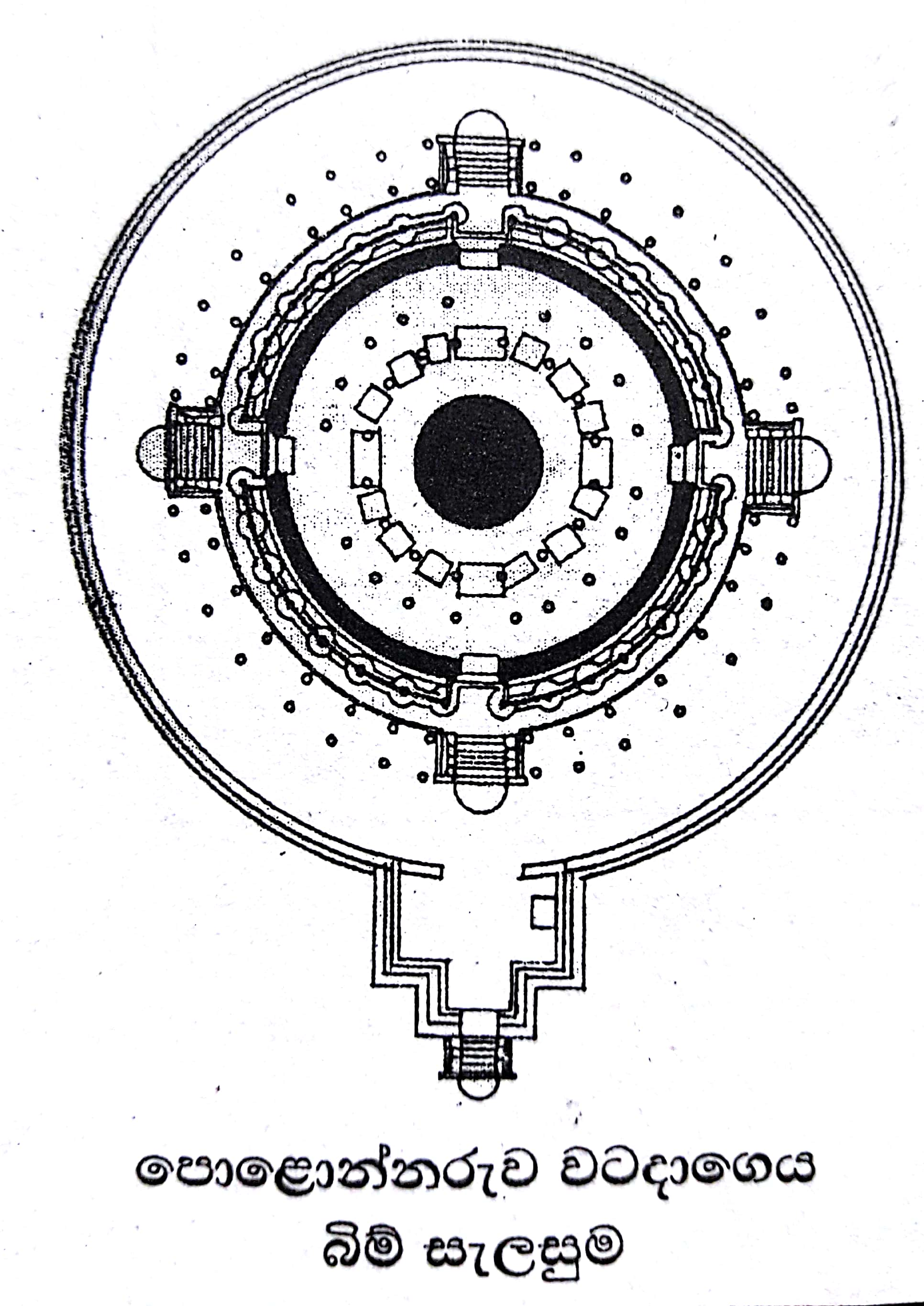 සිංහල: බාහිර වෘත්තයෙන් පහත වේදිකාව දැක්වෙන අතර දෙවන වෘත්තයෙන් ඉහල වේදිකාව දැක්වේ. ප්‍රතිමා සතරින් ආවෘත ස්තූපය, එමෙන්ම දොරටු සතර හරහා ප්‍රවේශ වියහැකි ඉහල වේදිකාව මත පිහිටි ඒක කේන්ද්‍රීය ශිලා ස්ථම්භ ත්‍රිත්වය